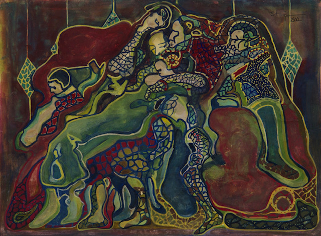 S/T, 1916, Acuarela y gouache sobre papel